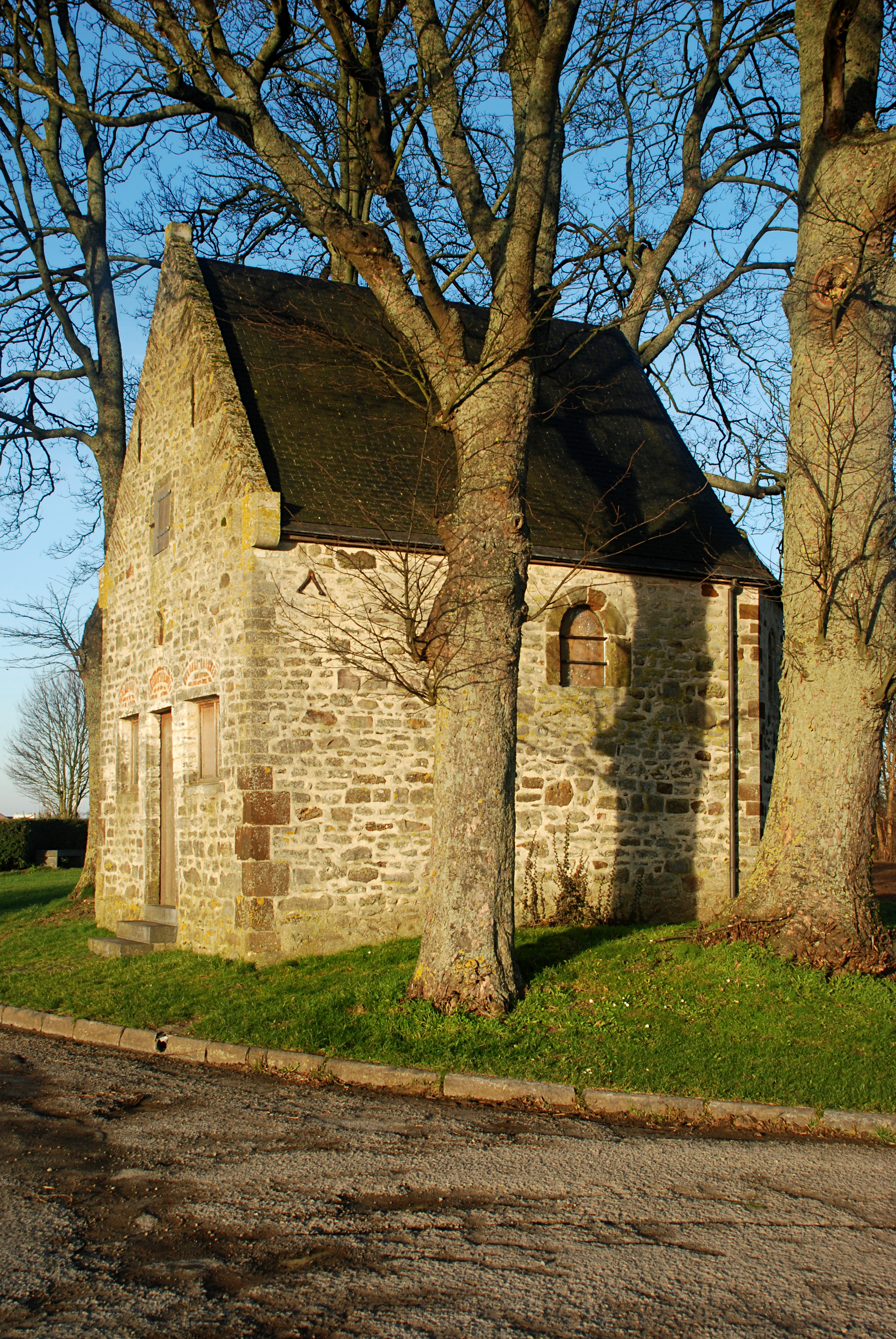 Belgique - Brabant wallon - Chaumont-Gistoux - Longueville - Chapelle du Chêneau